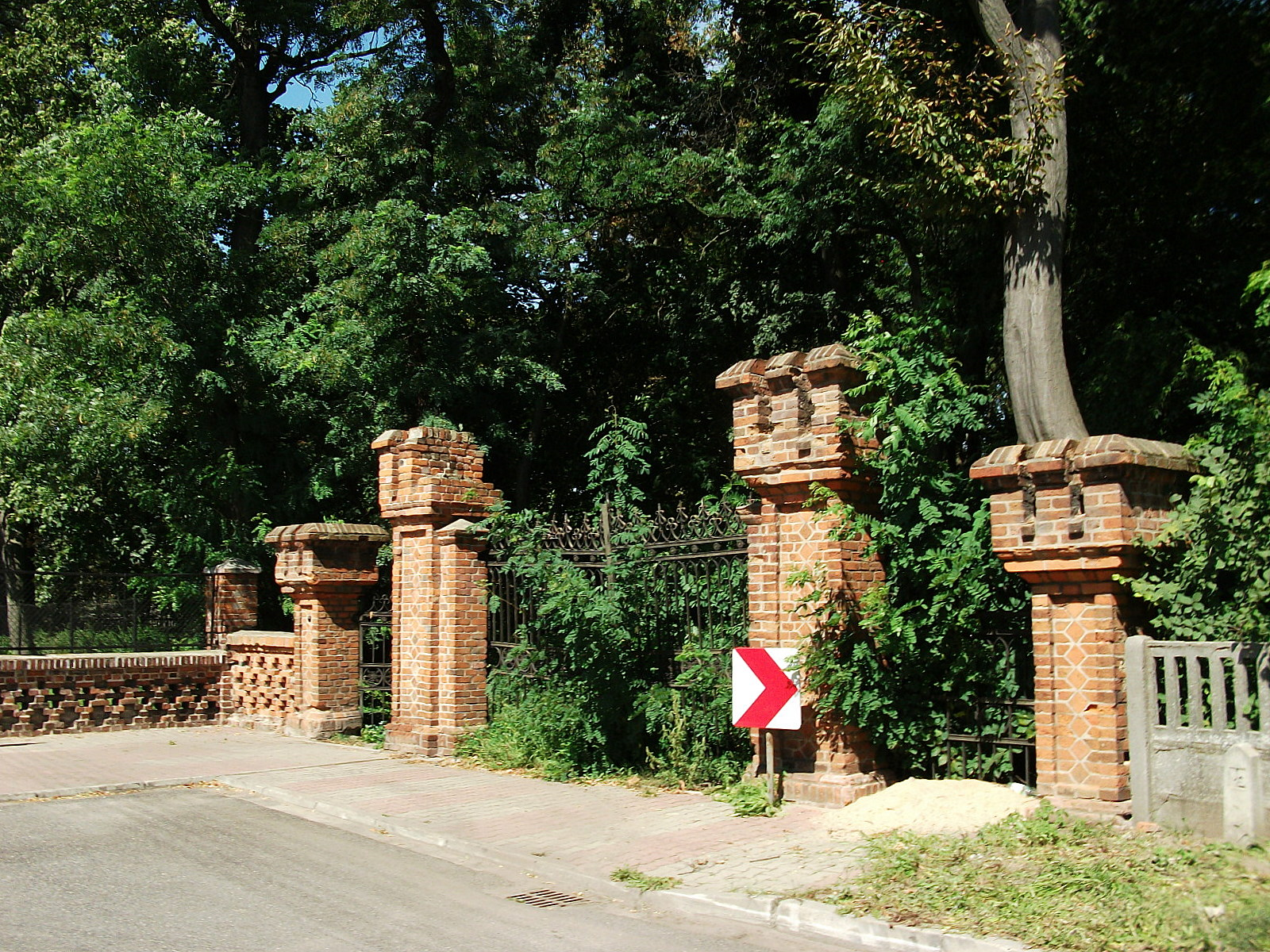 Bonikowo, park pałacowy, poł. XIX